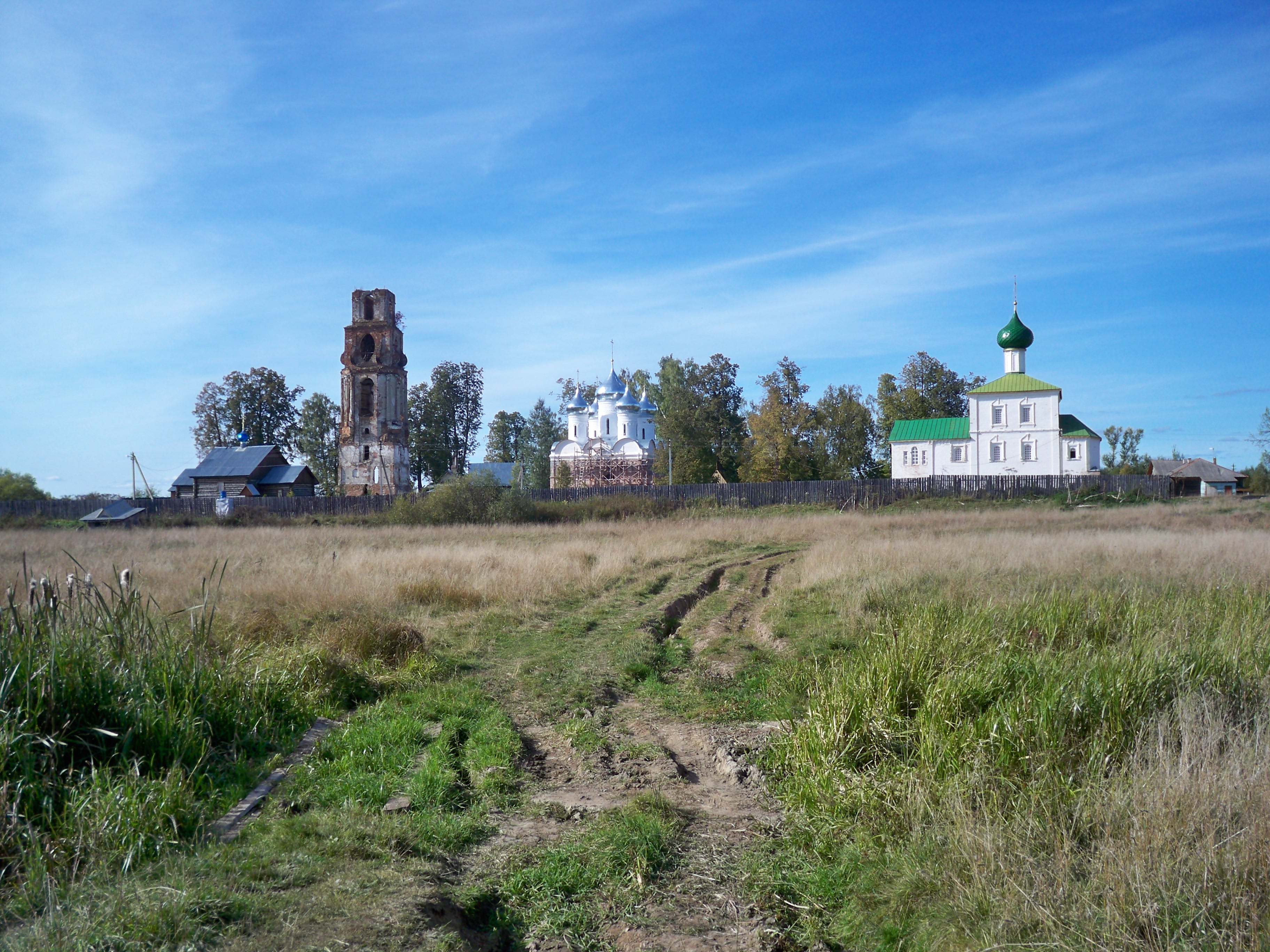 Современный вид на Геннадьевский монастырь, сентябрь 2009